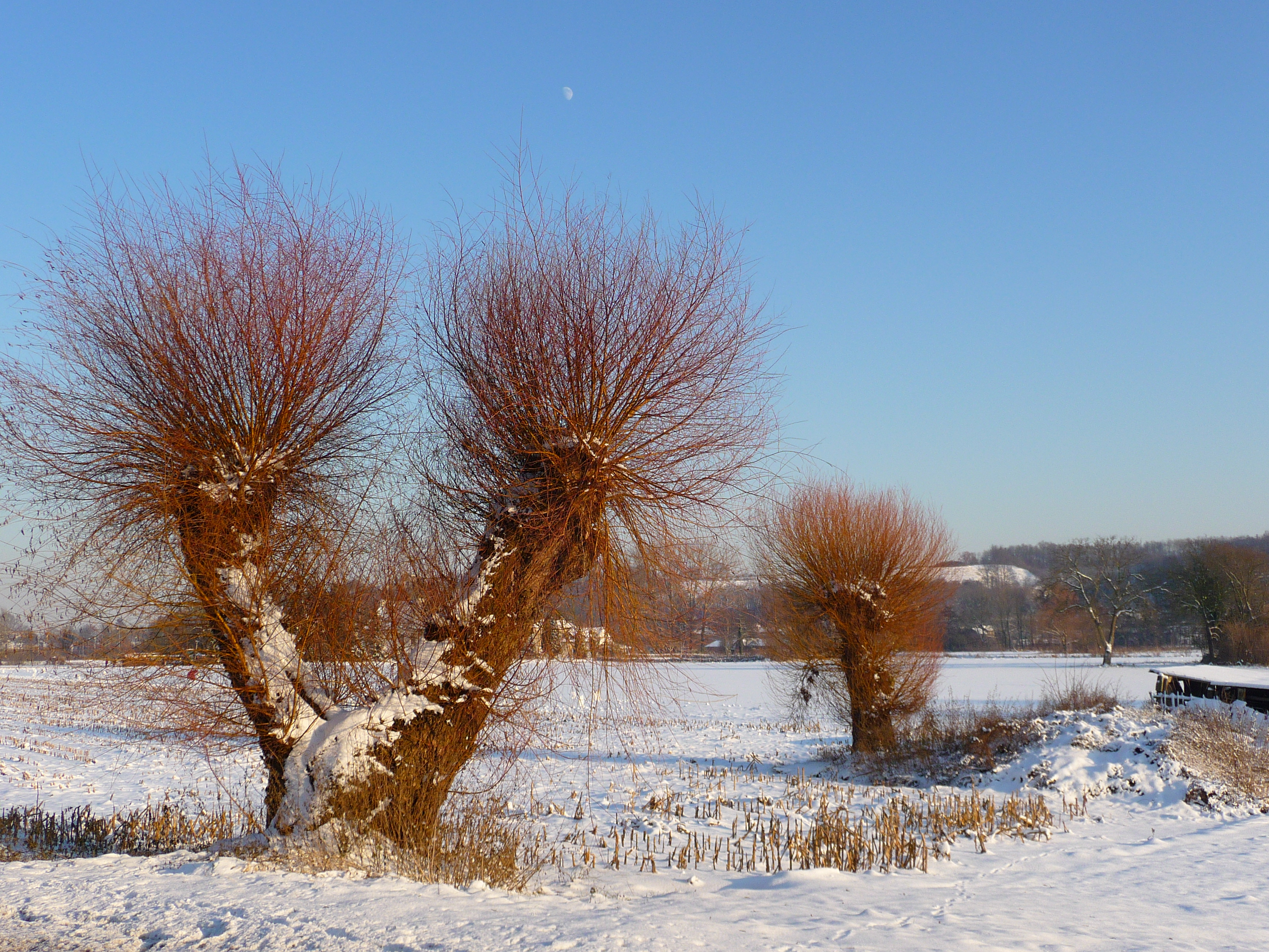 Knotwilgen in Maastricht met op de achtergrond de Sint-Pietersberg.